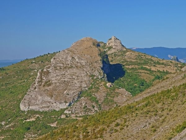 il s'agit du rocher de Dromont situé sur la commune de St Geniez dans les Alpes de Haute Provence où l'on situe la cité de Theopolis